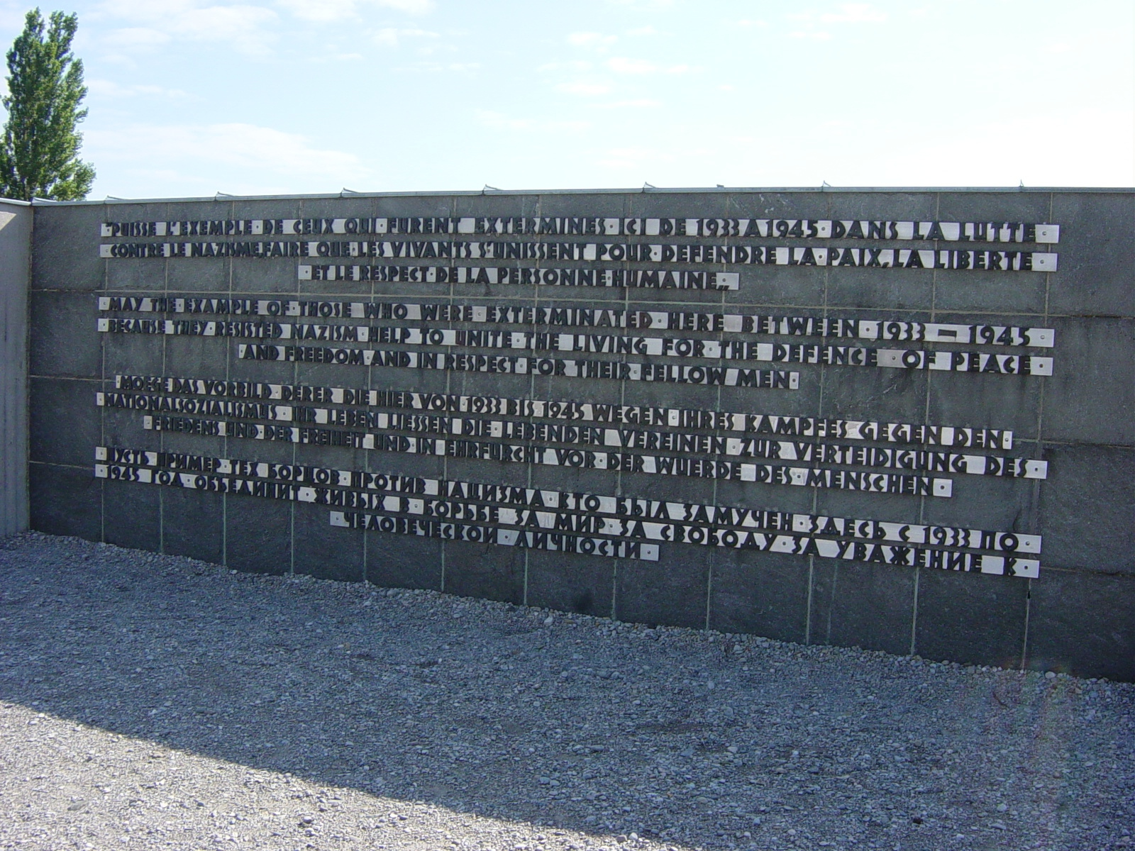 Quelle: Selber Fotografiert, 20.07.2005 Lizenz